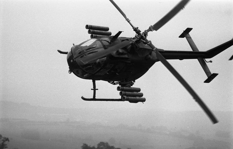 23.9.1986 Mitarbeiter des Bundespresseamtes beobachten das Herbstmanöver "Fränkischer Schild" der Bundeswehr - mit Beteiligung zahlreicher Soldaten aus NATO-Mitgliederstaaten sowie eines französischen Großverbandes - im Raum Würzburg.